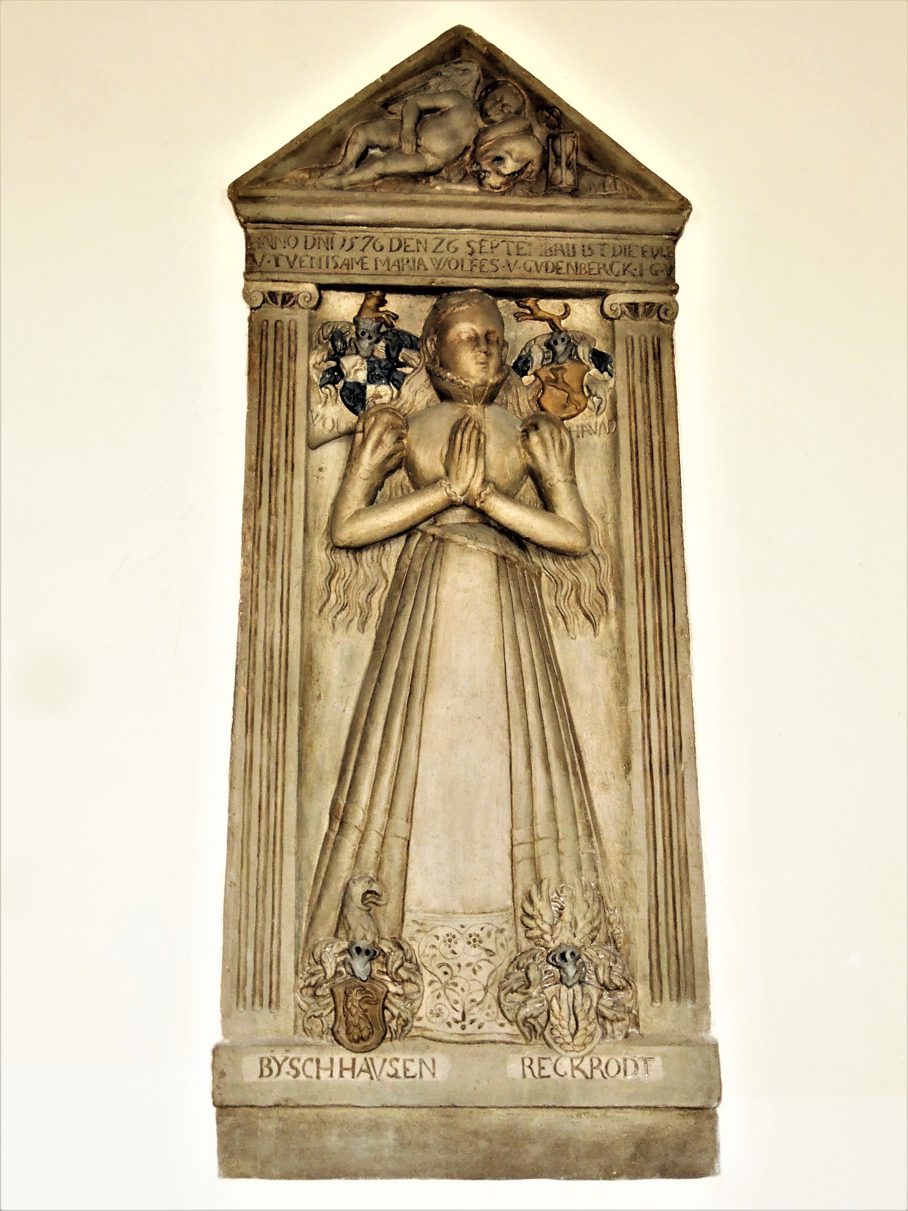 Wichdorf, Dorfkirche: Epitaph der 1576 verstorbenen Maria Wolff von Gudenberg, gestiftet von den Ritterfamilien von Bischoffshausen (Bischhausen) & von Reckrodt